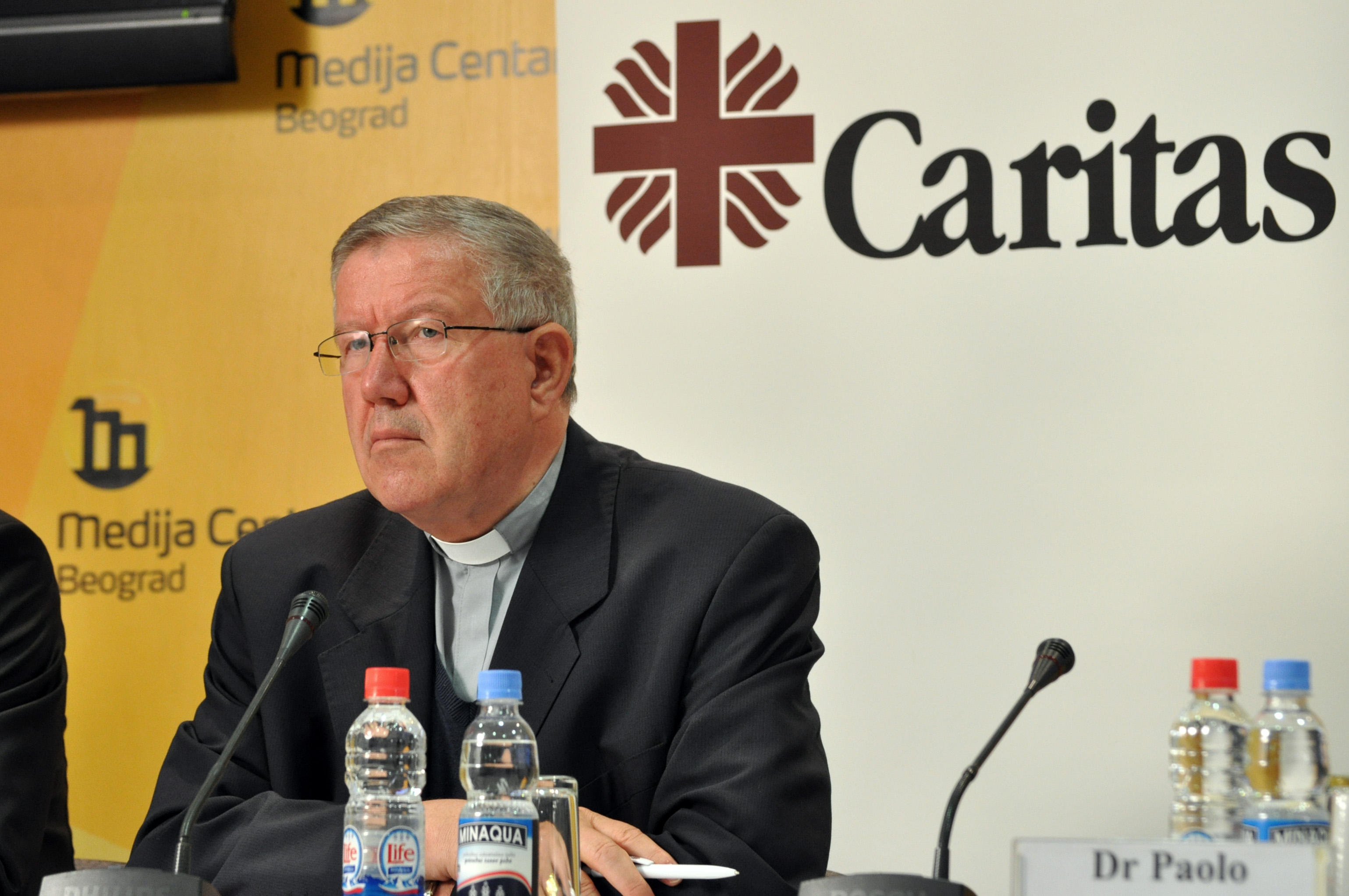 Stanislav Hočevar